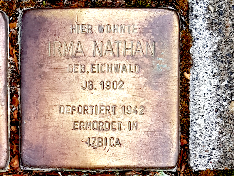 Stolperstein für Irma Nathan, Lerchenstr. 25, Duisburg-Neudorf